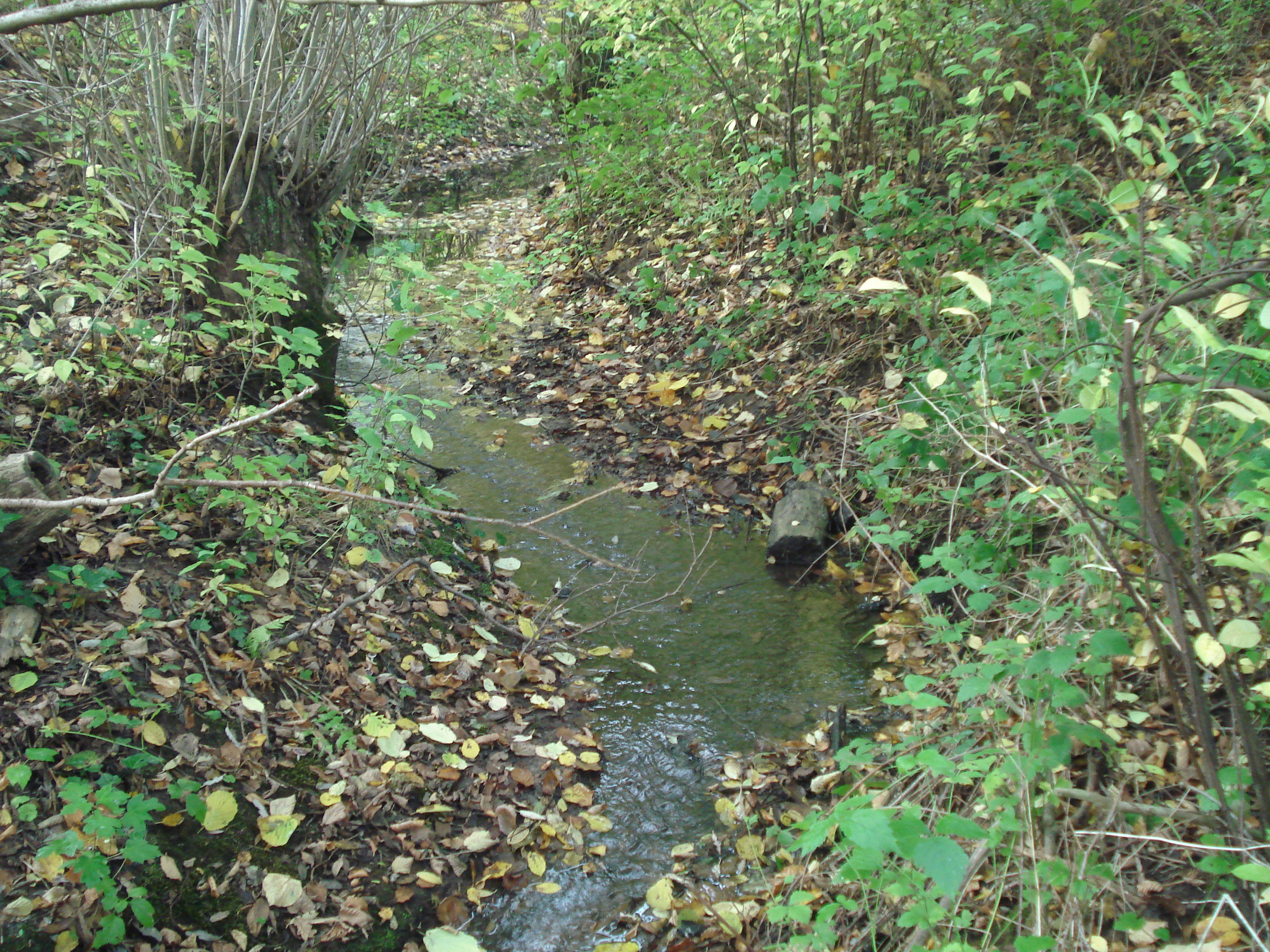 Der Otterbach kurz vor seiner Mündung in die Mud